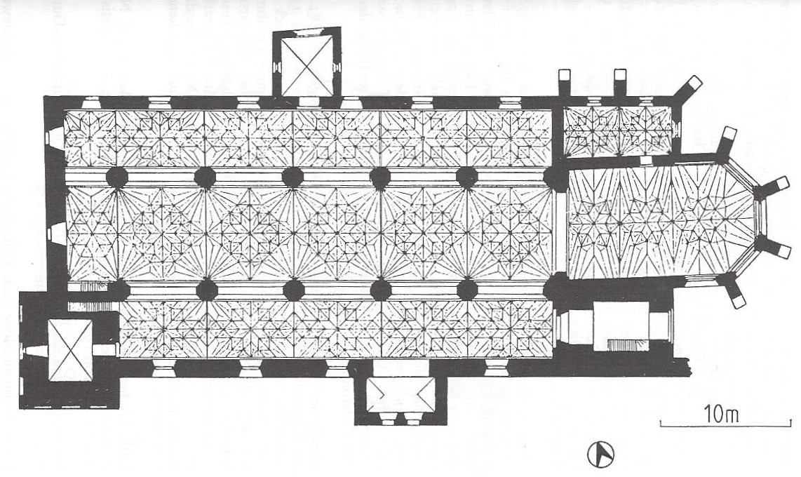 Grundriss der St.-Georg-Kirche in Rastenburg